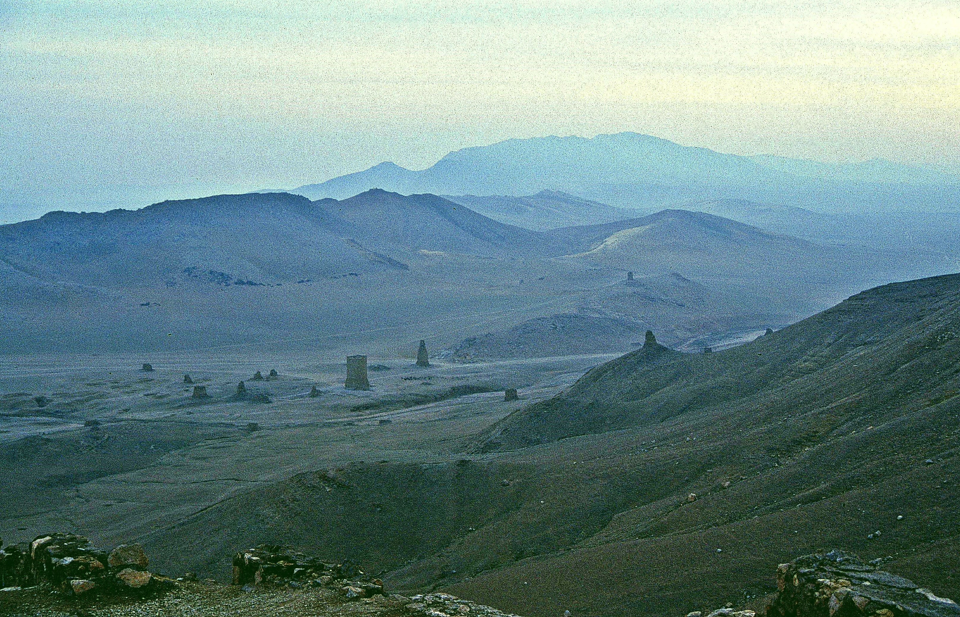 Palmyra: Tal der Gräber